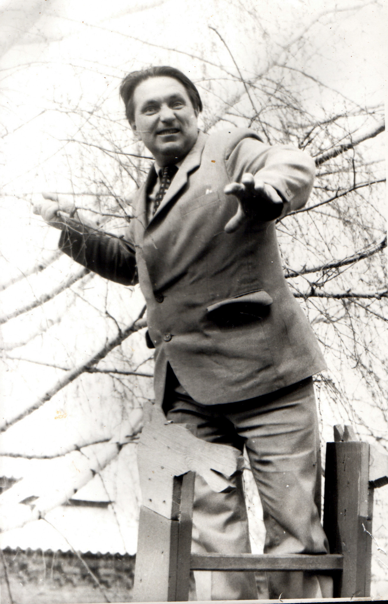 Сова був веселим і енергійним чоловіком, створював фігурки з дерева, малював смішні ескізи і жартував разом з своїми учнями